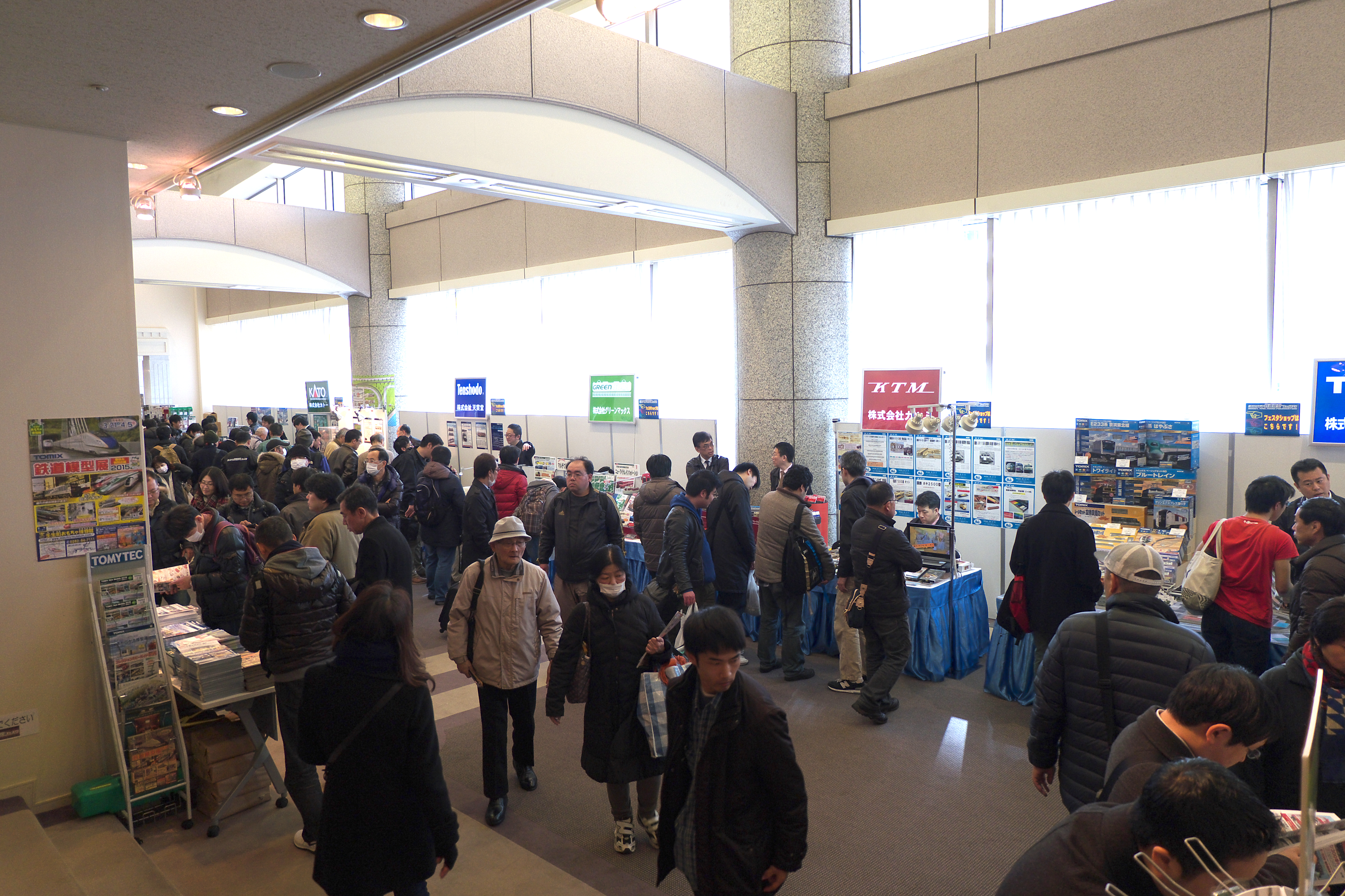 ヨコハマ鉄道模型フェスタ2013 新製品エリア